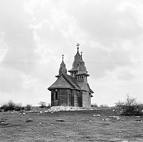 Fosta biserică de lemn a mănăstirii greco-catolice de la Cheile Turzii (demolată în anul 1968).